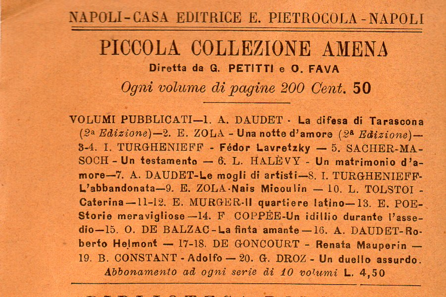 Manuali Pietrocola n.3 Il risorgimento italiano secondadi copertina: elenco delle uscite al 1897 della serie Piccola Collezione Amena